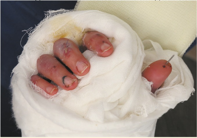 rechte, transplantierte Hand am 20. Tag nach der Transplantation